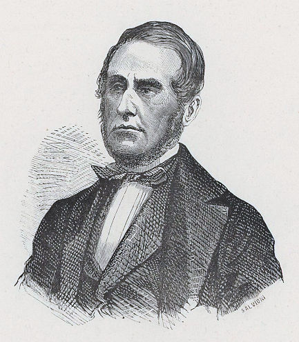 Ruggiero Gabaleone di Salmour